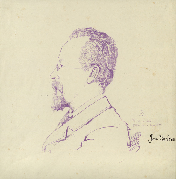 Беларуская (тарашкевіца): Партрэт Яна Карловіча